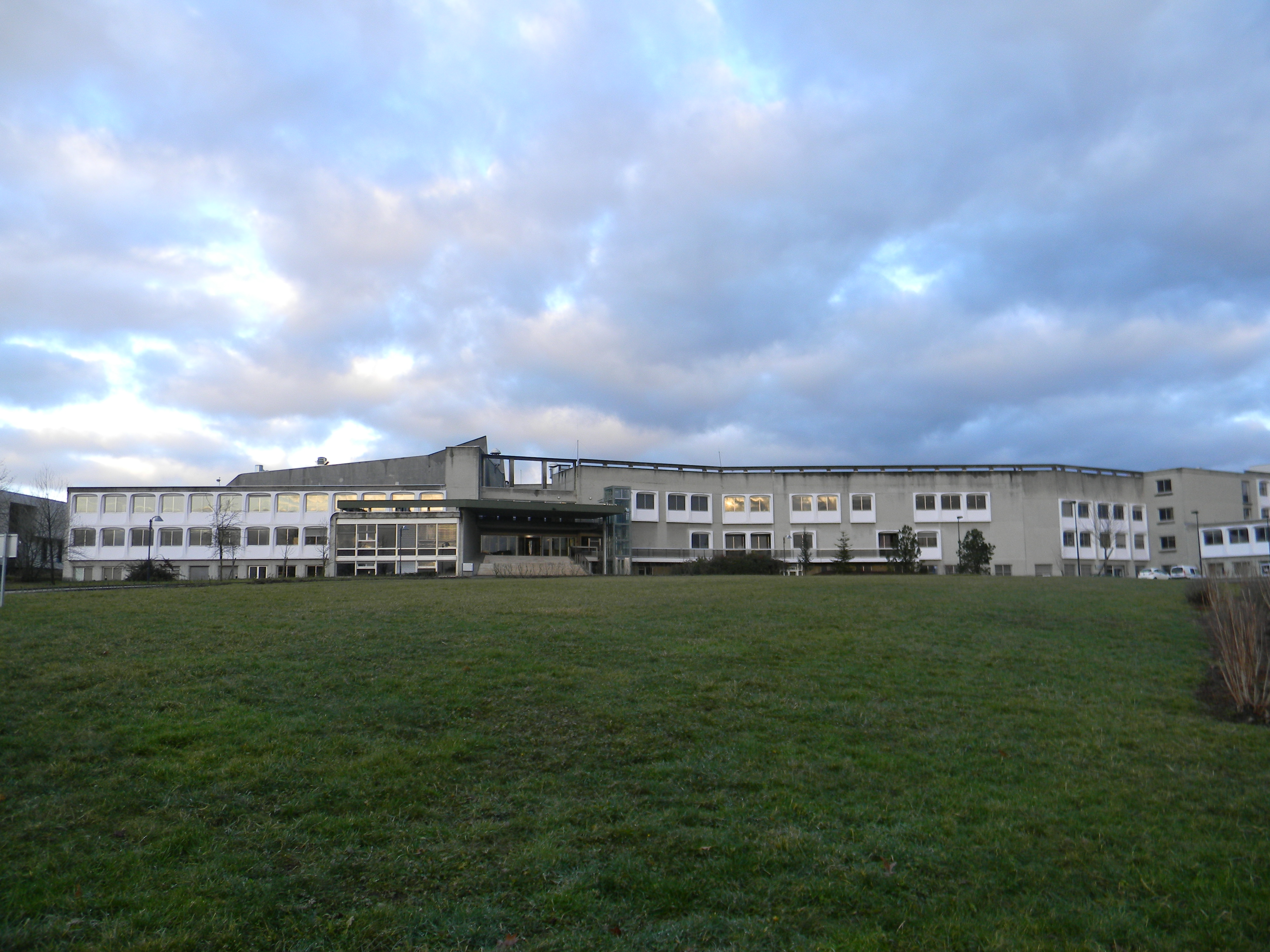 Le campus vétérinaire de VetAgro Sup (précédement École nationale vétérinaire de Lyon) à Marcy-l'Étoile.